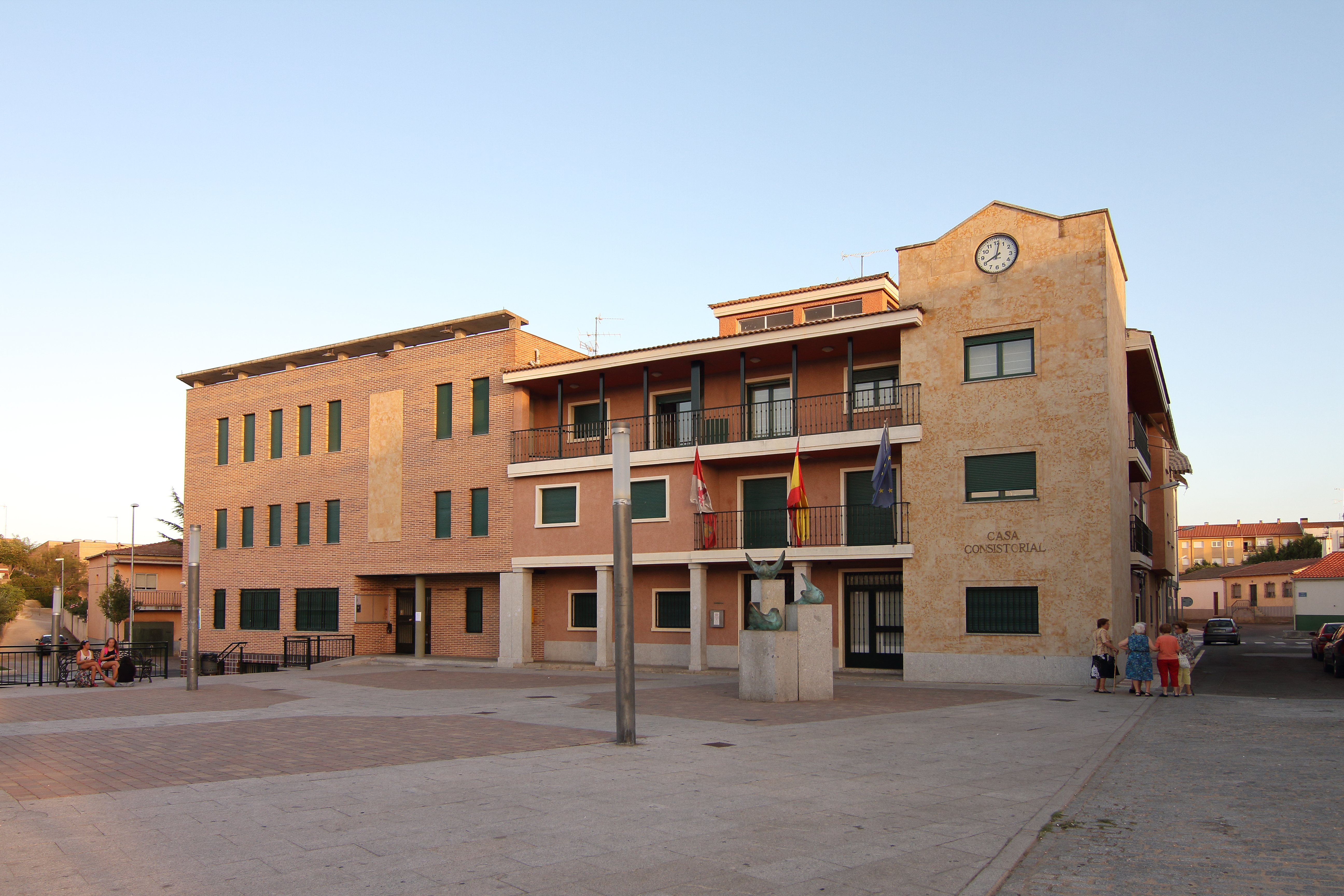 Ayuntamiento de Carbajosa de la Sagrada